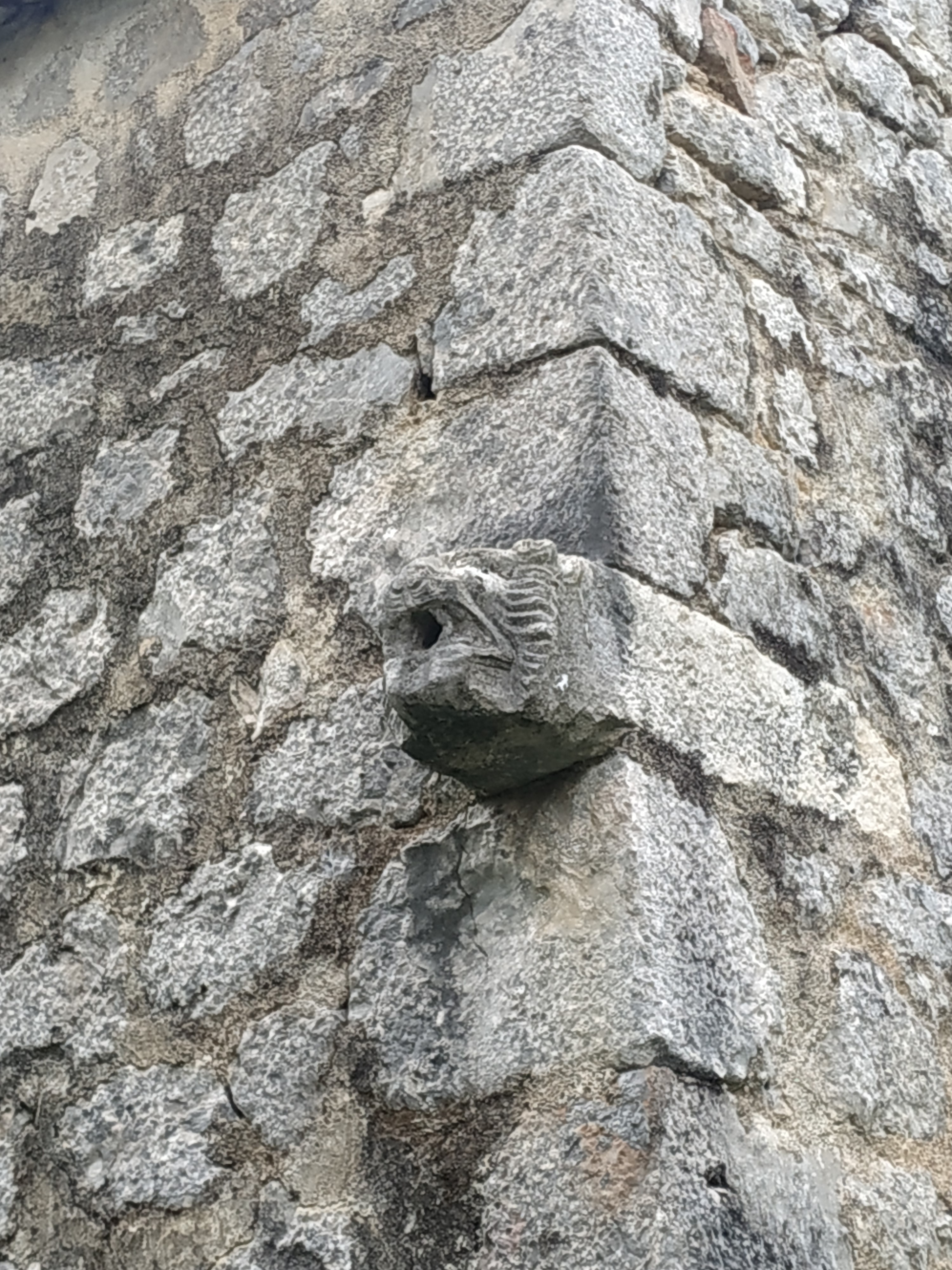 Isklesana lavlja glava uzidana u zid kuće